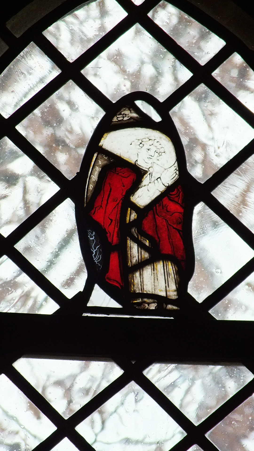 Evangelische Kirche Launsbach, Gemeinde Wettenberg, Landkreis Gießen, Hessen, Deutschland